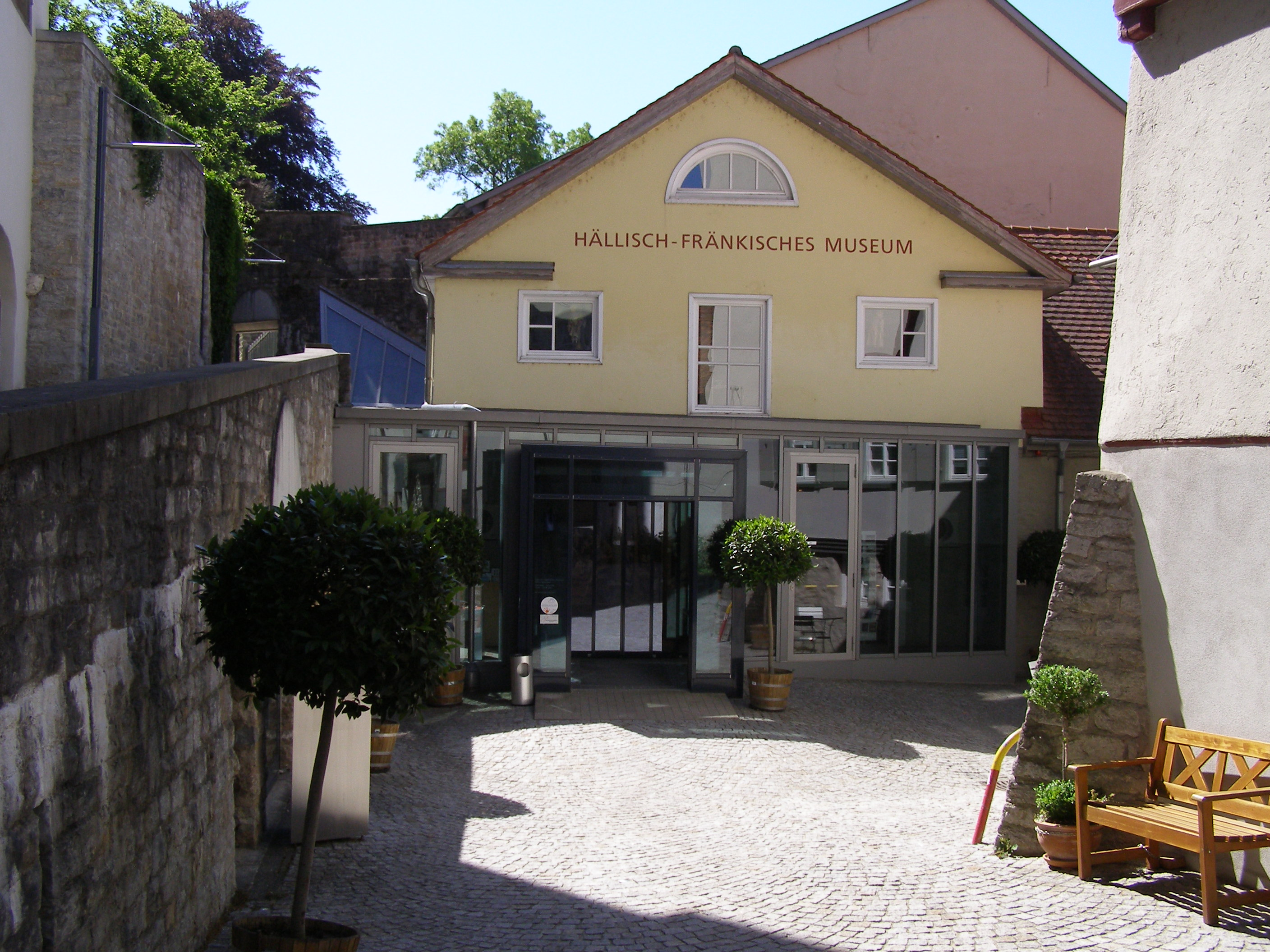 Das Eingangsgebäude des HFM ist einer von sieben Bauten, in denen das Museum untergebracht ist.